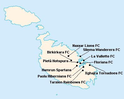 Répartition des clubs en Premier League Maltaise 1997-1998.